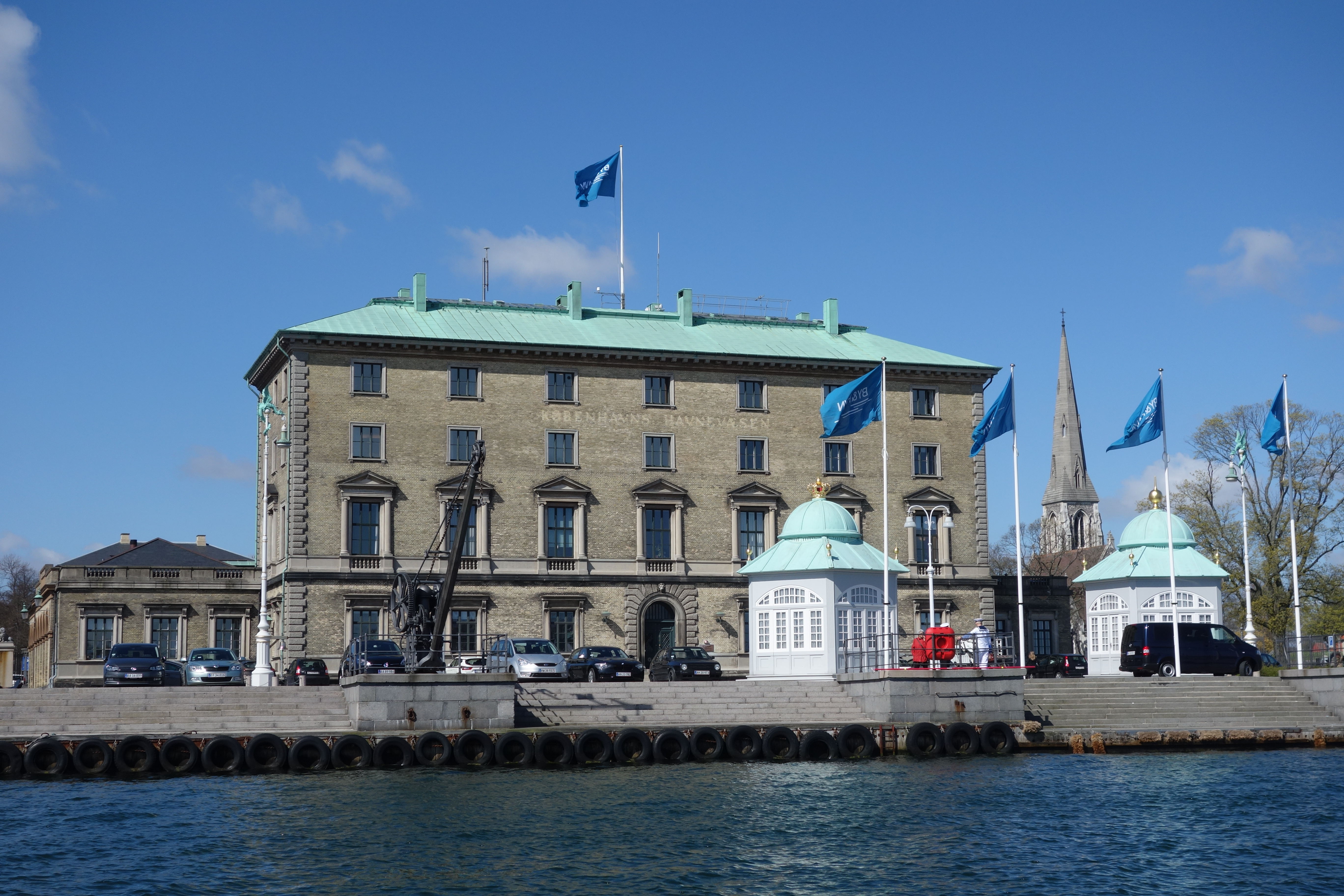 By & Havn's building at Nordre Toldbod in Copenhagen, Denmark